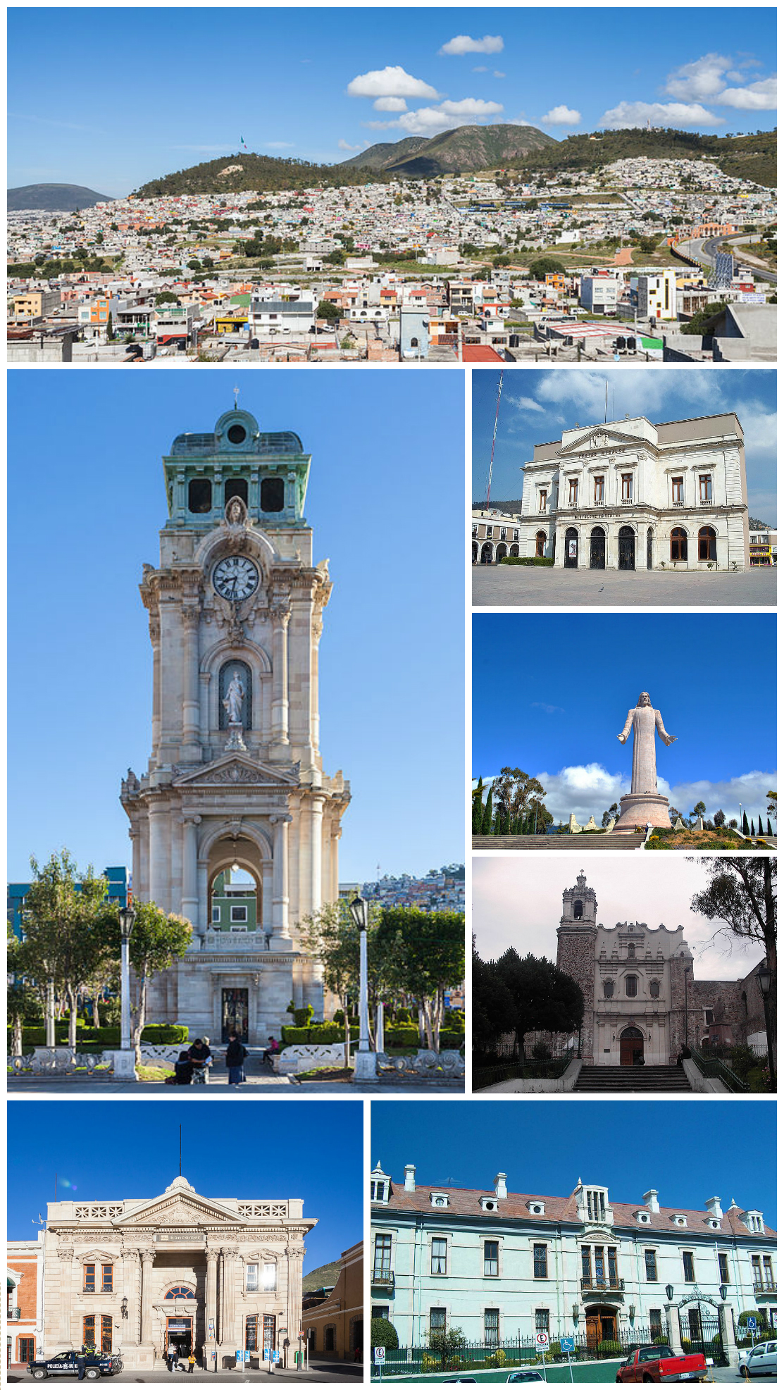 Pachuca de Soto